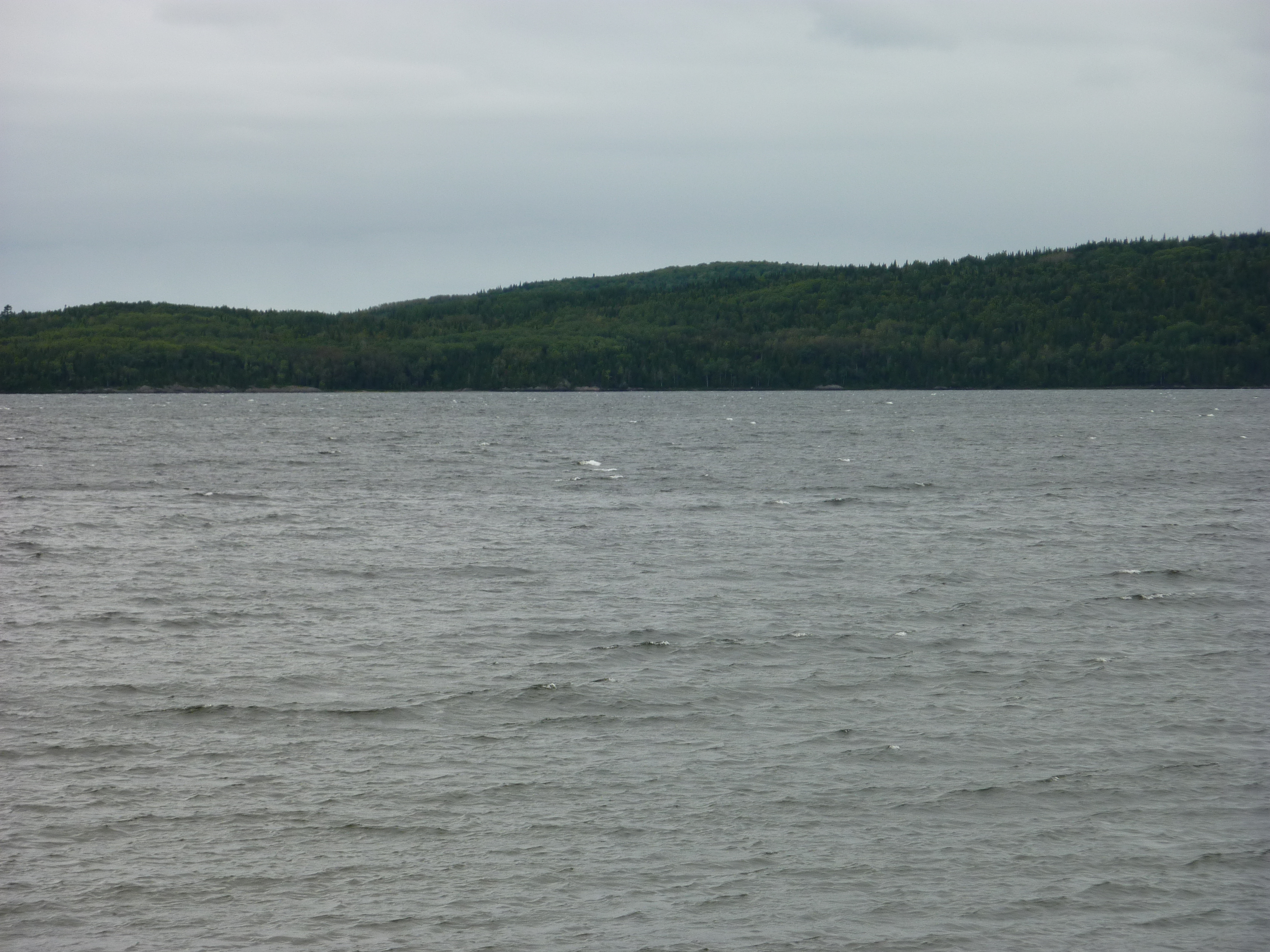 Lac Matapédia vu à partir du belvédère de Val-Brillant